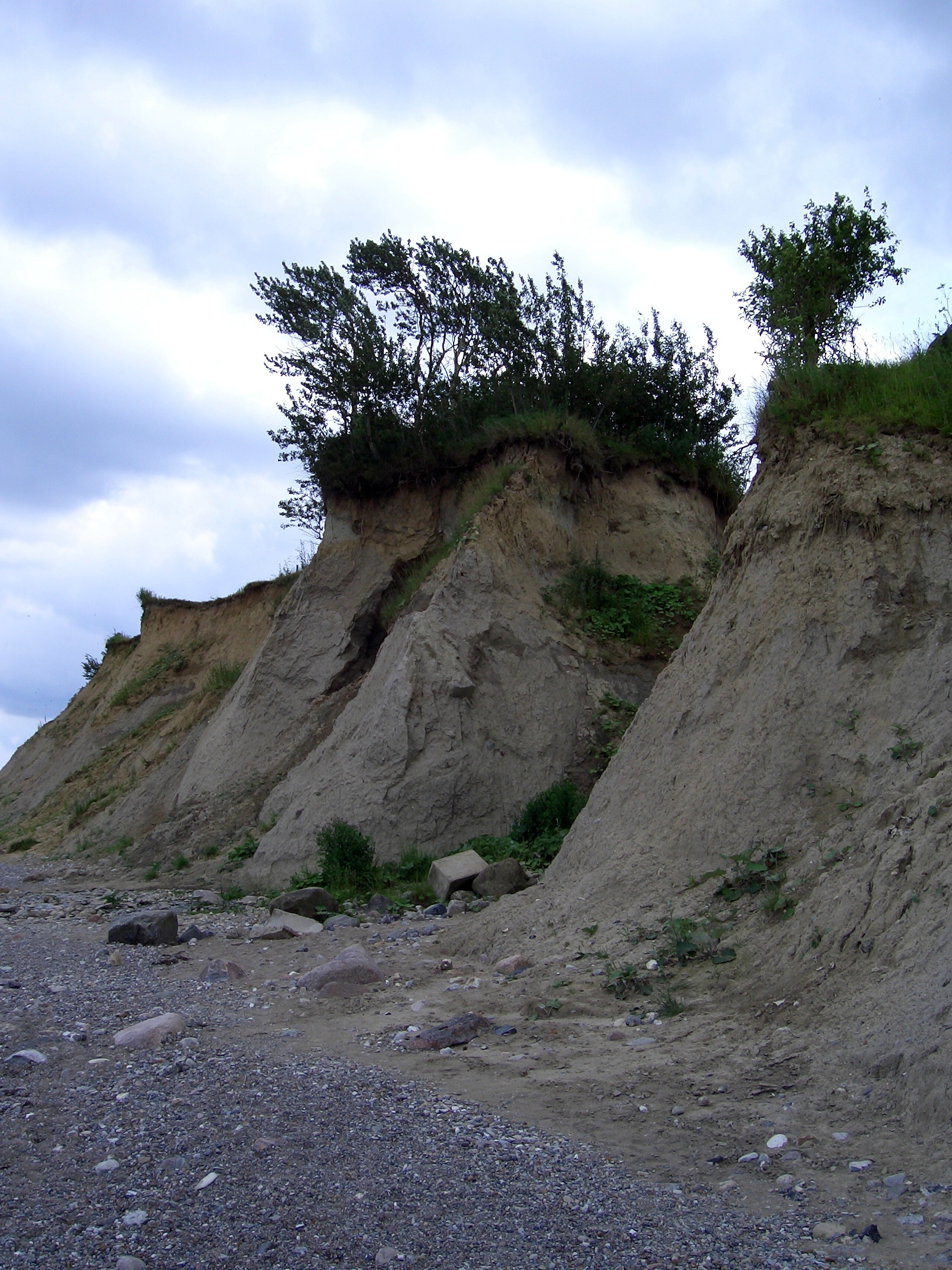 Steilküste bei Niendorf/Ostsee (Timmendorfer Strand)